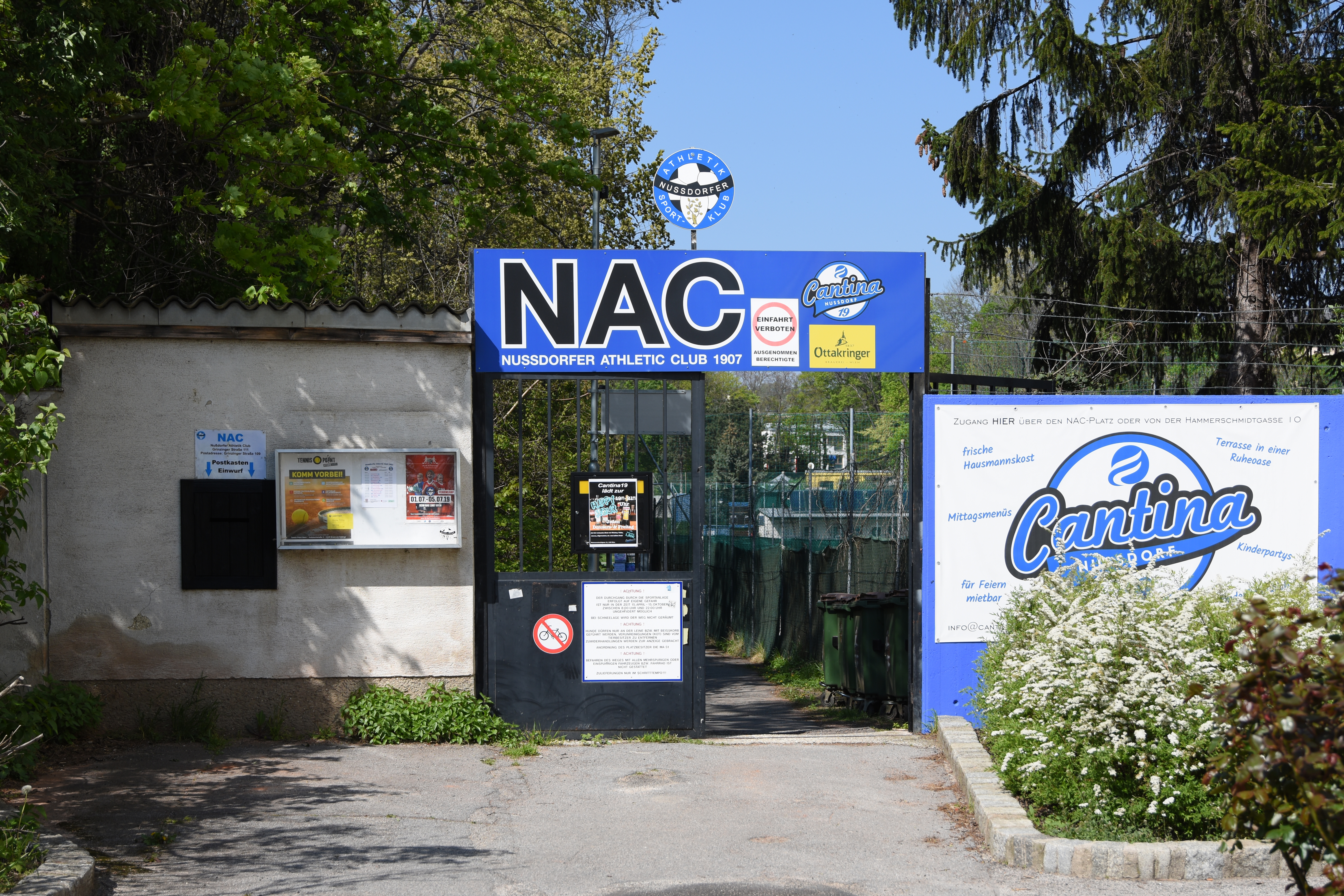 Eingang zum Sportplatz des NAC (Nussdorfer Athletic Club 1907) in Heiligenstadt